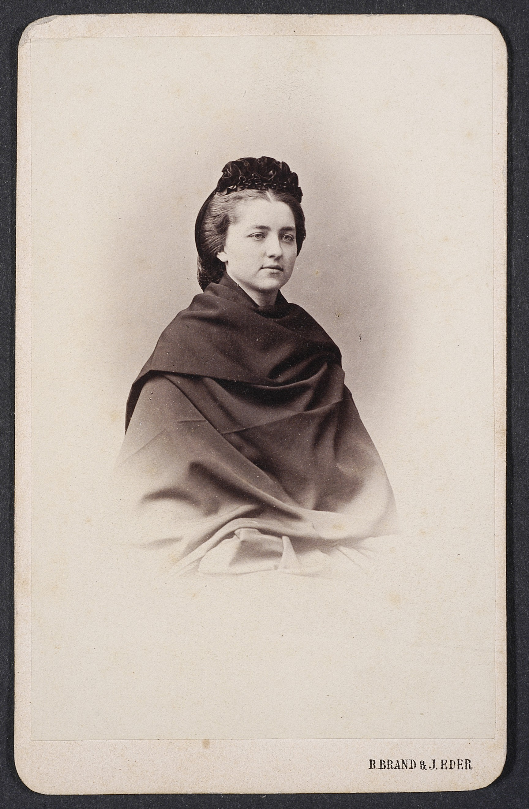 Anastazja Dzieduszycka, ok. 1863 r.